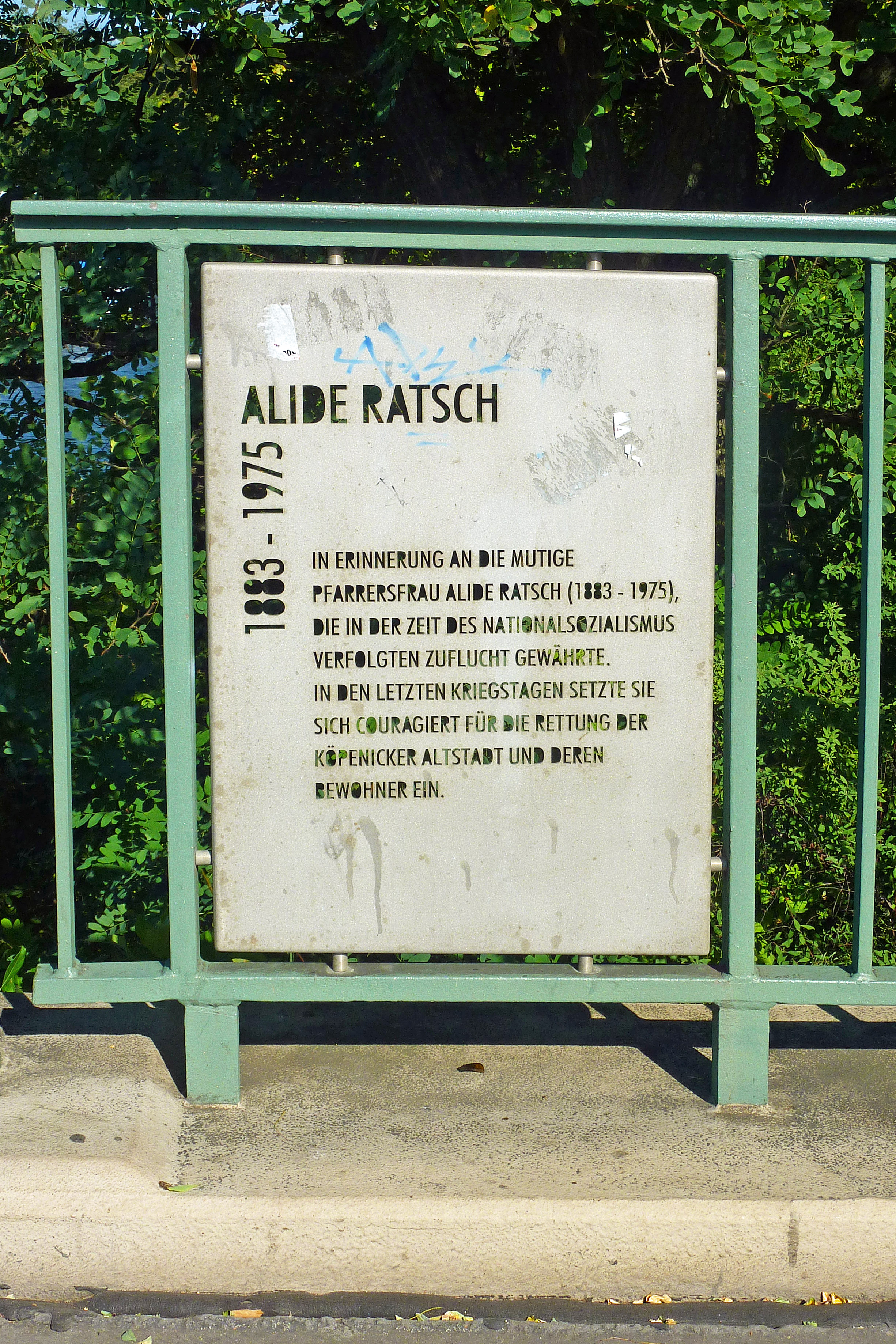 Gedenktafel für Alide Ratsch an der Dammbrücke in Berlin-Köpenick. Gestaltet von Ulrich Stulpe und eingeweiht am 30. November 2011. Fotografiert an der Südostseite der Brücke. [1]